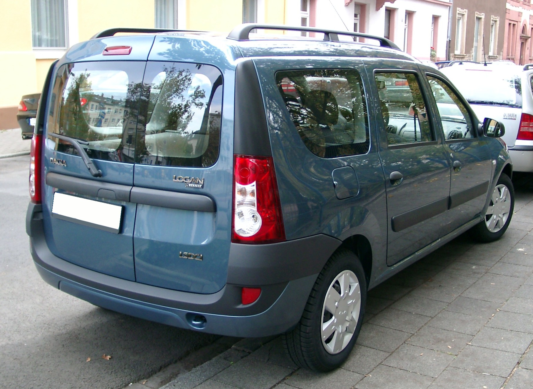 Dacia Logan Kombi